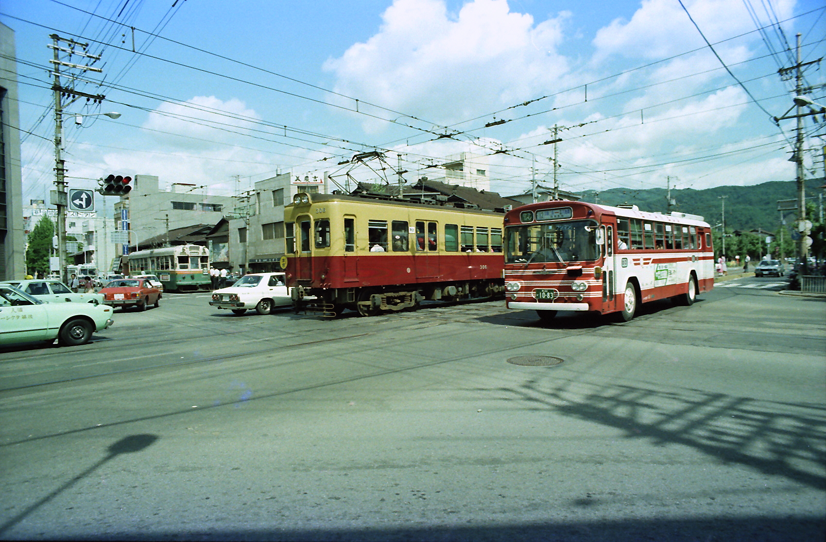 東山三条交差点（京阪京津線と平面交差）京都市東山区三条通